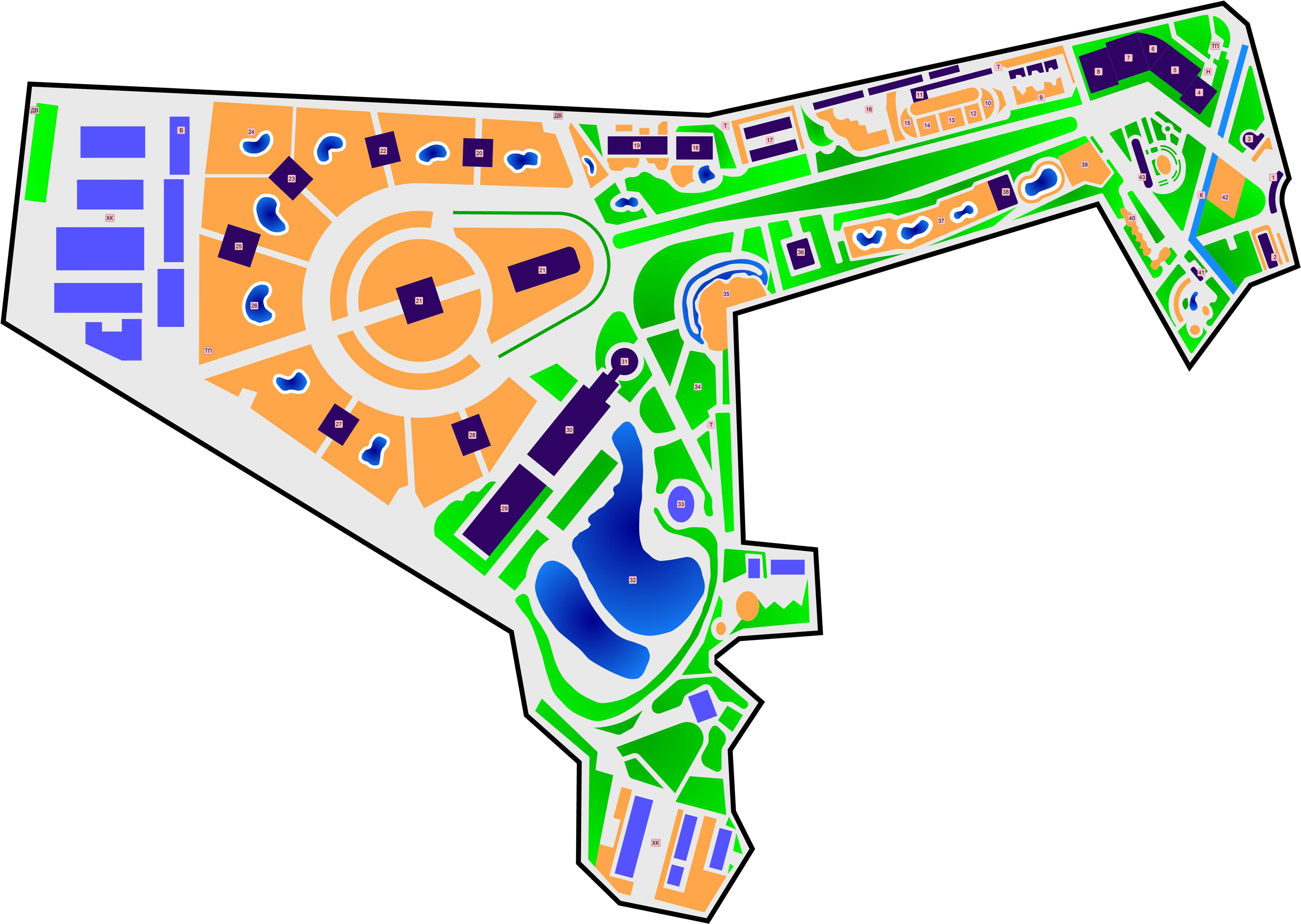 Схема ташкентского зоопарка